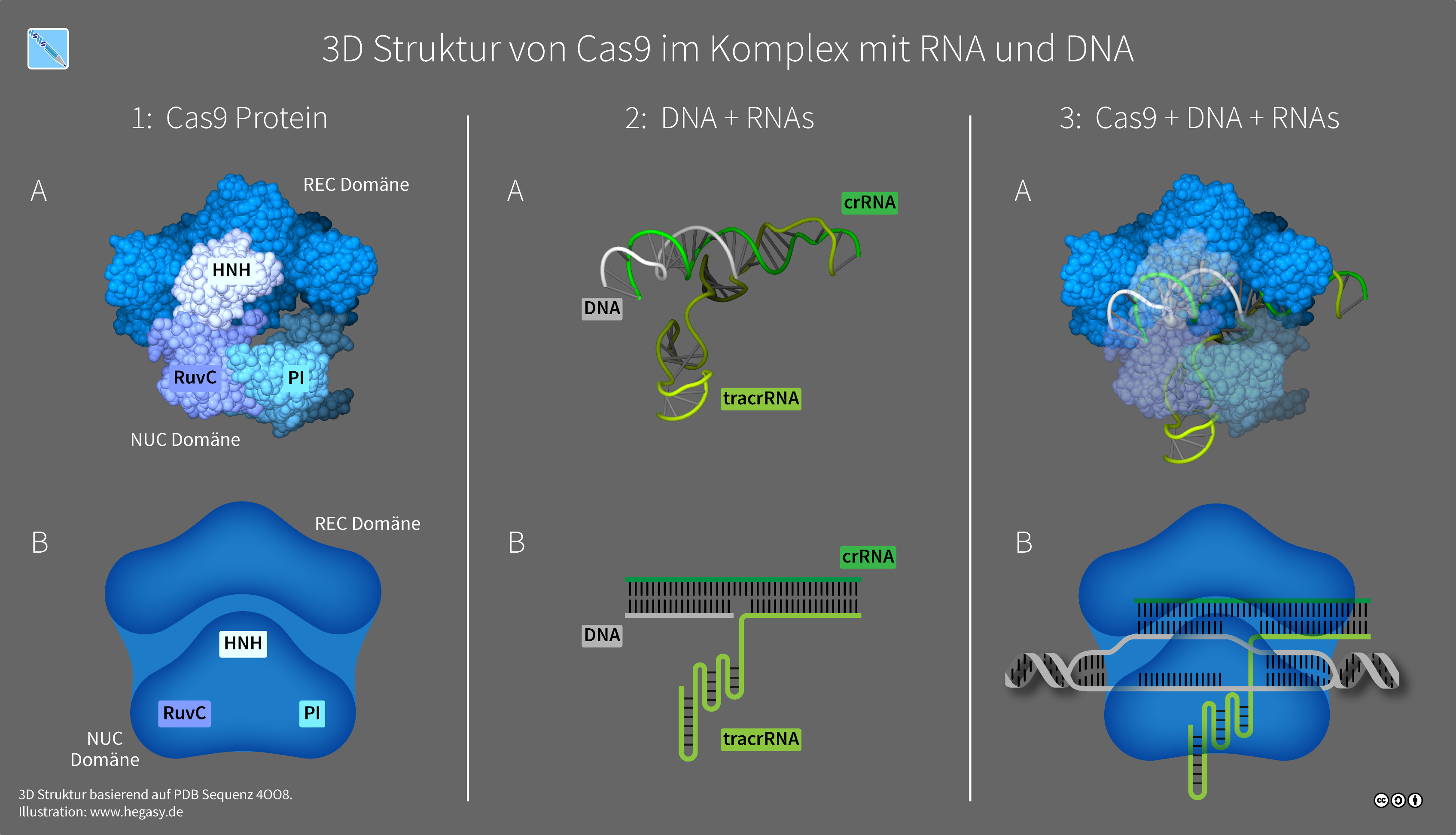 3D Struktur des CRISPR-Cas9 Interferenz-Komplexes. Alle dargestellten 3D-Modelle basieren auf den Kristallisierungsdaten der PDB Sequenz 4OO8. 1A: Struktur von Cas9 Protein. Markierung: REC Domäne (Recognition), NUC Domäne (Nuclease) sowie die funktionellen Domänen PI (PAM Interacting), HNH und RuvC. 1B: Abstrakte Darstellung von Cas9. 2A: Konformation von crRNA, tracrRNA und DNA. 2B: Abstrakte Darstellung der Moleküle in 2A. 3A: Der vollständige Interferenz-Komplex aus Cas9 und dem tracrRNA-crRNA-Duplex. Die NUC-Domäne ist semitransparent dargestellt. 3B: Abstrakte Darstellung des Komplexes in 3A.